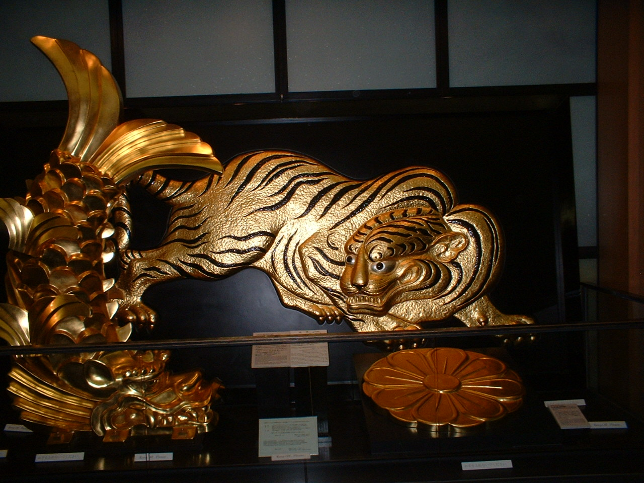 Réplicas de los adornos del Castillo de Osaka expuestas en el museo del interior del castillo.